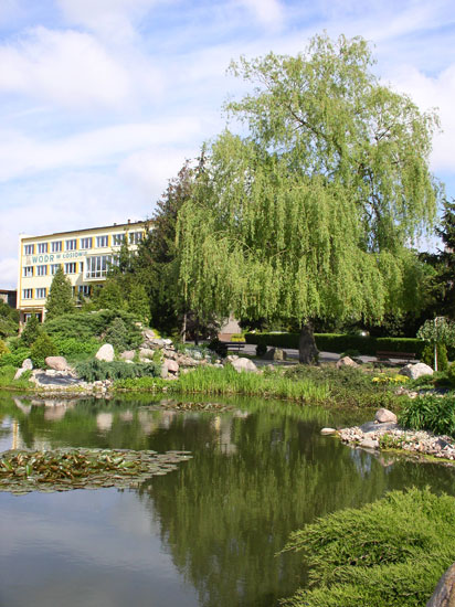 Łosiów - Opolski Ośrodek Doradztwa Rolniczego. Przykład ekologicznego zagospodarowania niepotrzebnego zbiornika przeciwpożarowego.